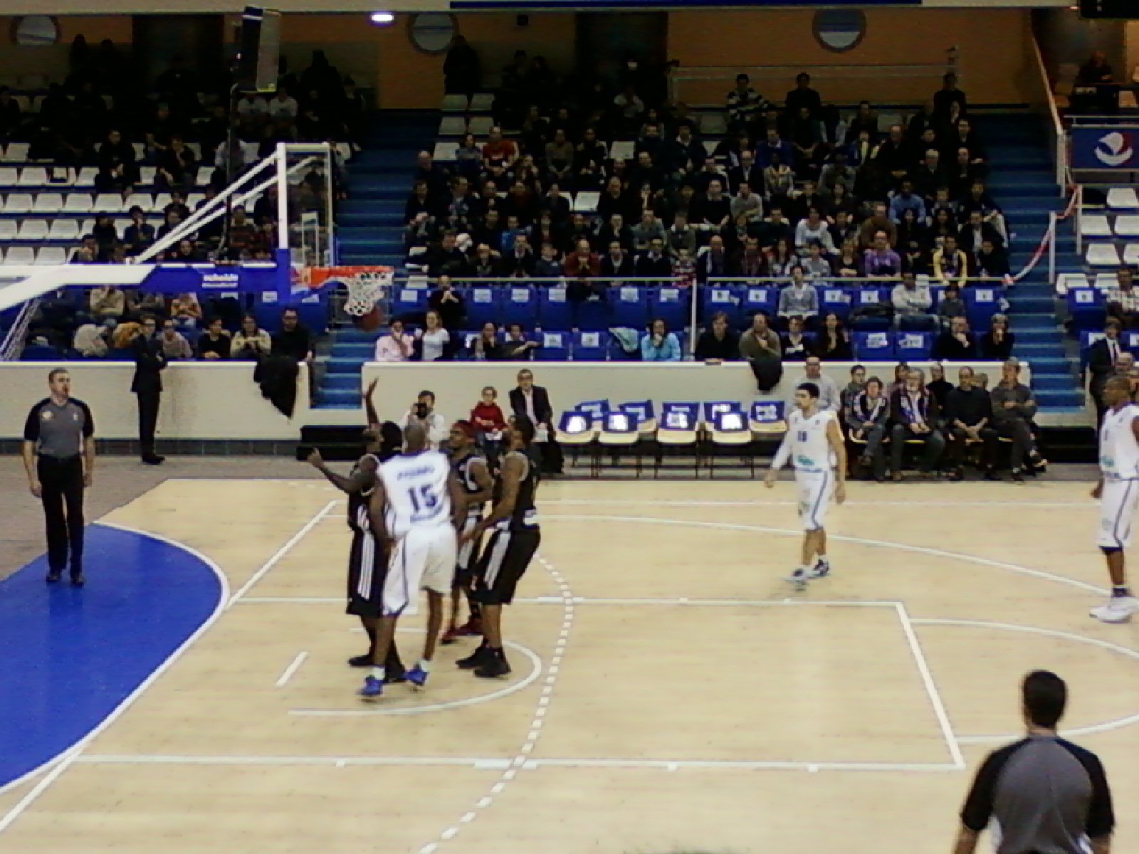 Action lors du match Paris - Dijon du 03 décembre 2011 au stade Pierre-de-Coubertin